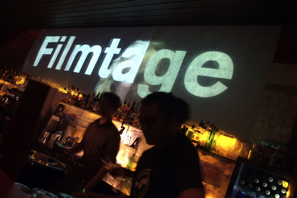 Solheure